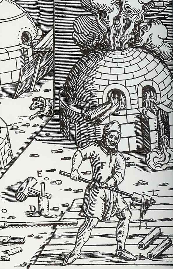 Treibofen zur Trennung eines Edelmetalls